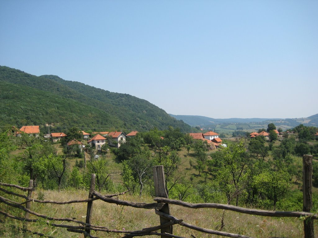 Svrackovci